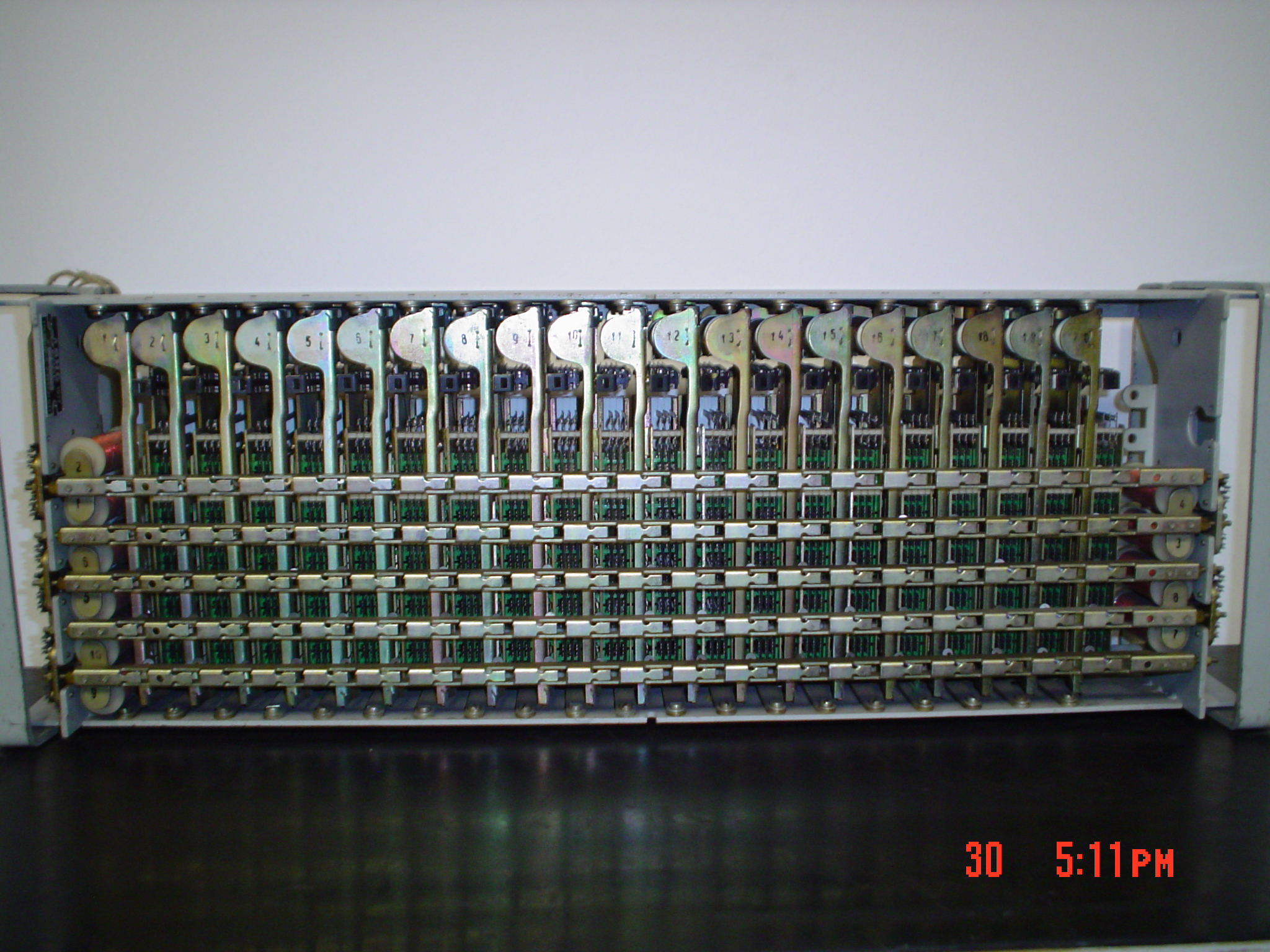 Crossbar gép (Telefonmúzeum, Miskolc)